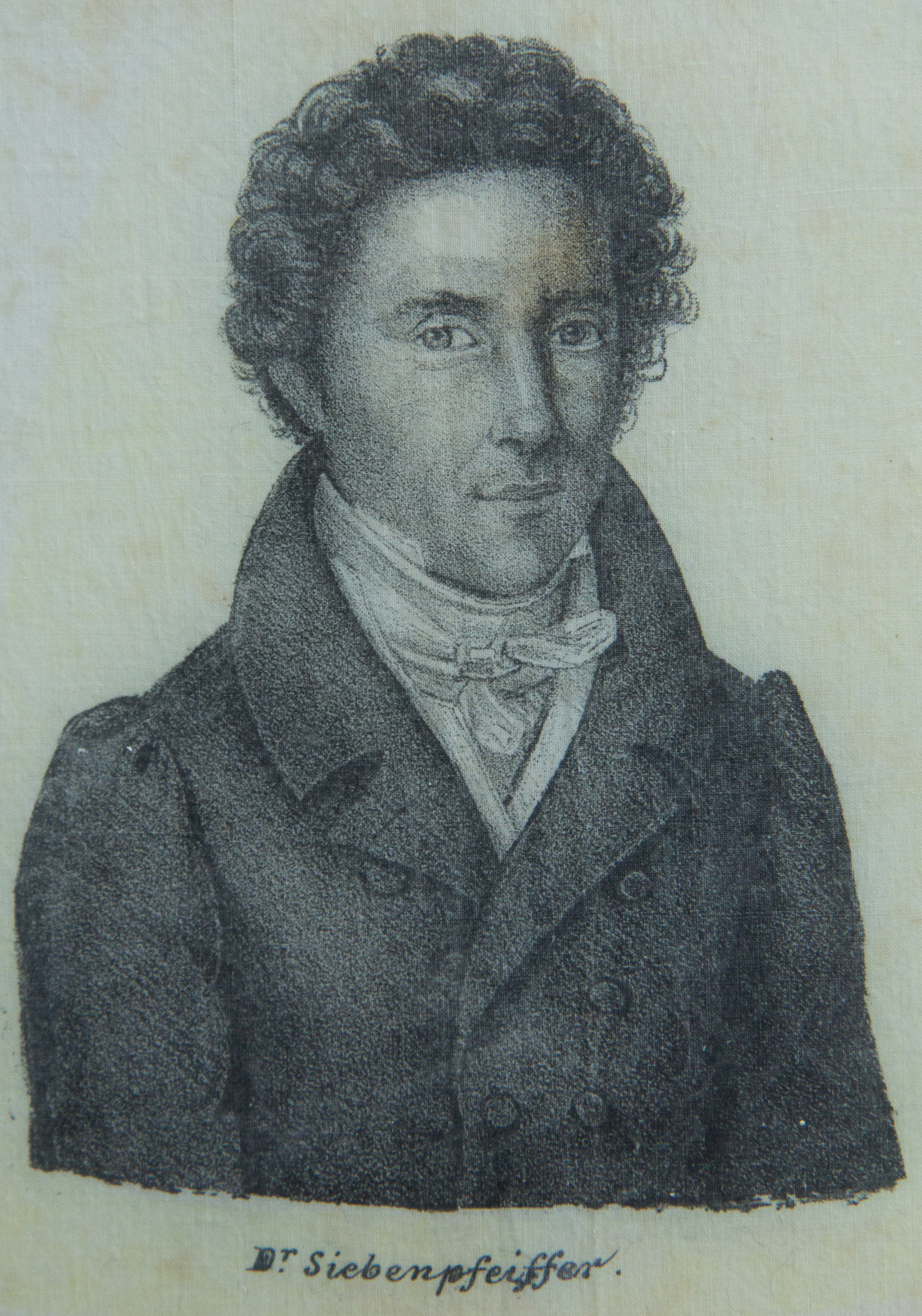 Hambacher Tuch, fotografiert im Archiv des Liberalismus in Gummersbach: Philipp Jakob Siebenpfeiffer (1789-1845)